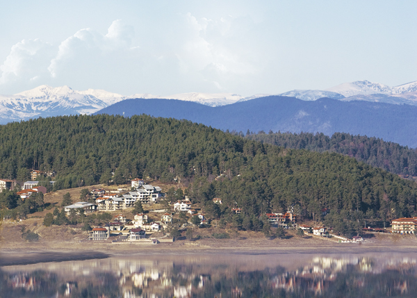 Изглед към курорт Цигов чарк2